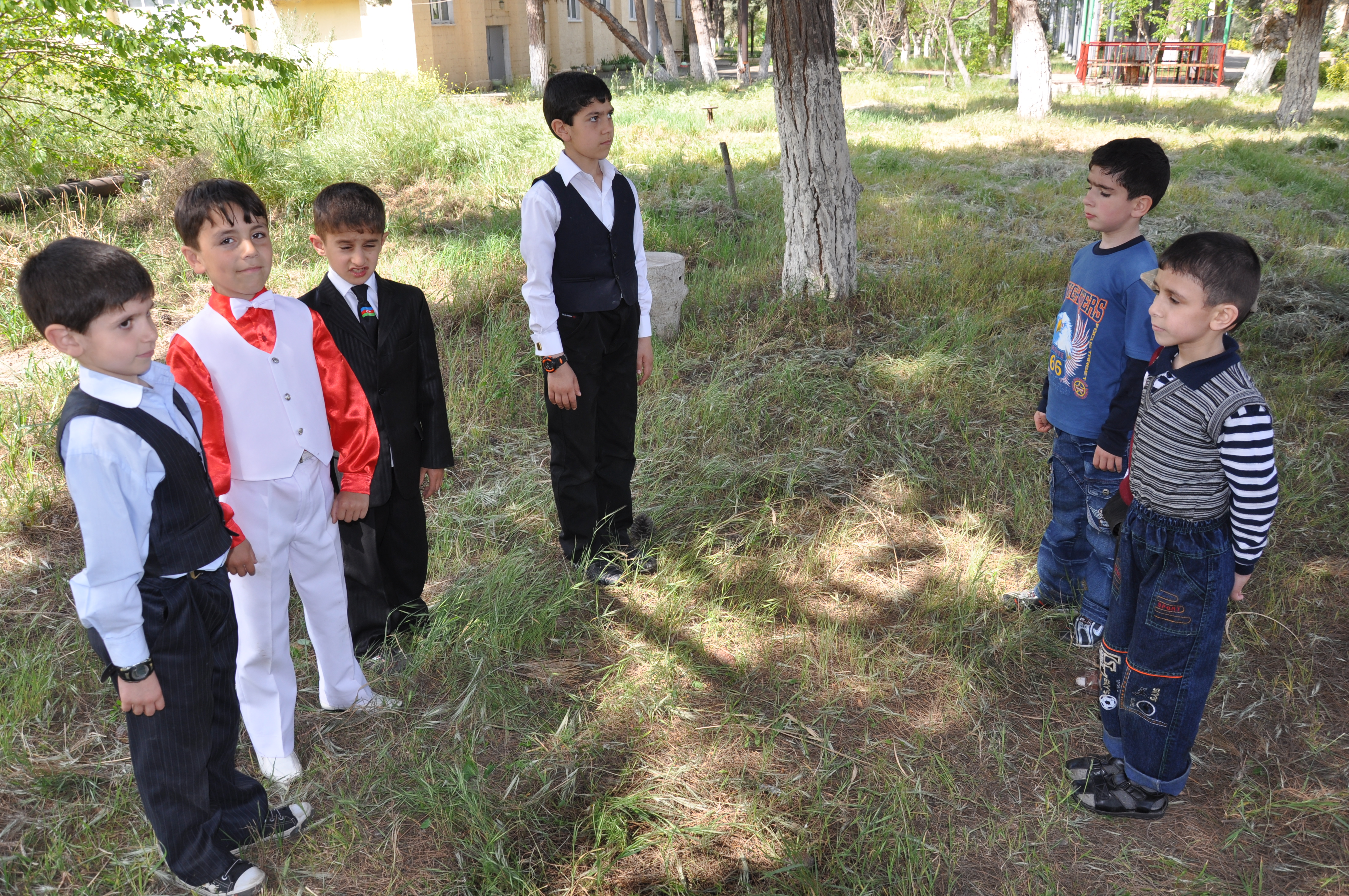 Dolama - Azərbaycanda ən çox yazqabağı (bayramqabağı) günlərdə əsasən uşaq və gənclər arasında, geniş şəkildə oynanılan qədim oyunlarından biridir.